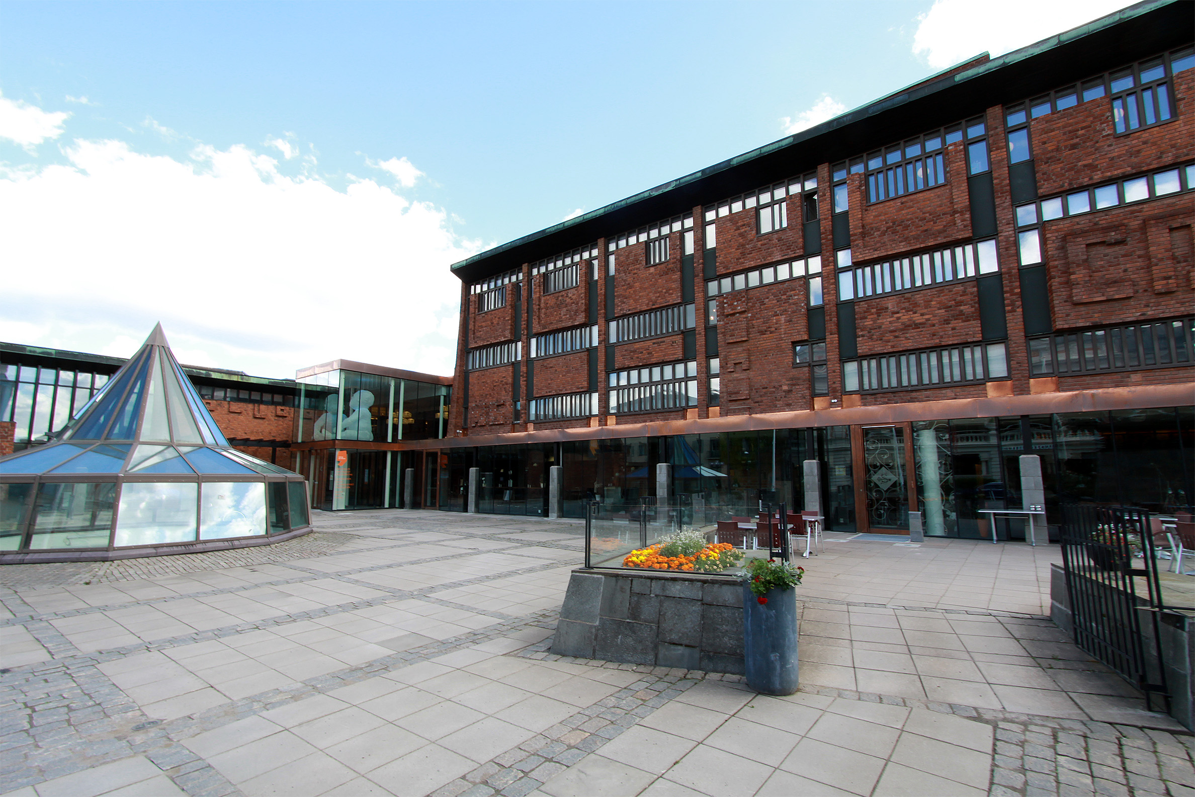 Skövde Kulturhus efter ombyggnation 2013.